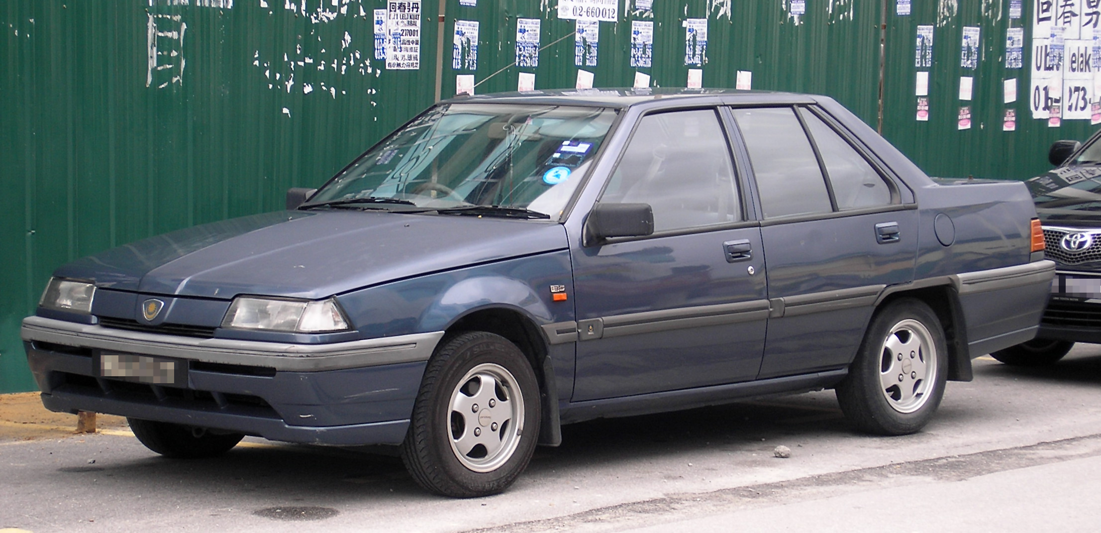 Front-side shot of a Proton Saga Iswara (saloon), in Serdang, Selangor, Malaysia.